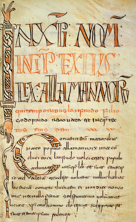 Page de titre de la lex Alamannorum (Stiftsbibliothek St. Gallen, Cod. Sang. 731, p. 295, e-codices).